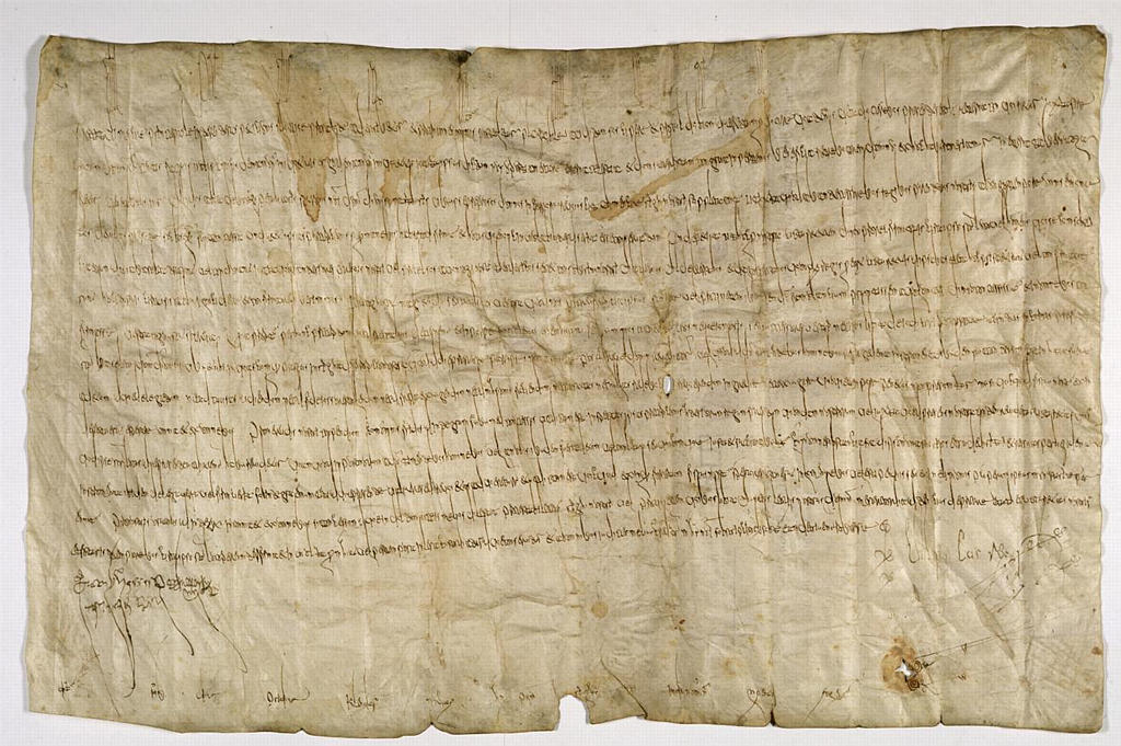 Le roi Chilpéric II confirme les privilèges d'immunité accordés par ses ancêtres à l'abbaye de Saint-Denis. Document en latin portant la signature autographe du roi. Parchemin d'environ 66 x 43 cm.